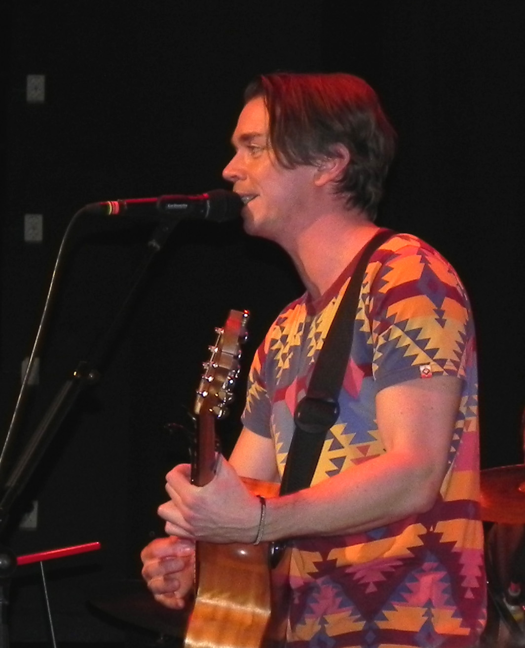 Emil Jensen spelar på Victoria teater, Malmö, 27 november 2013